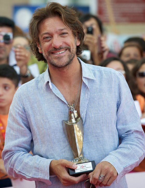 Sergio Assisi al Giffoni Film Festival 2012